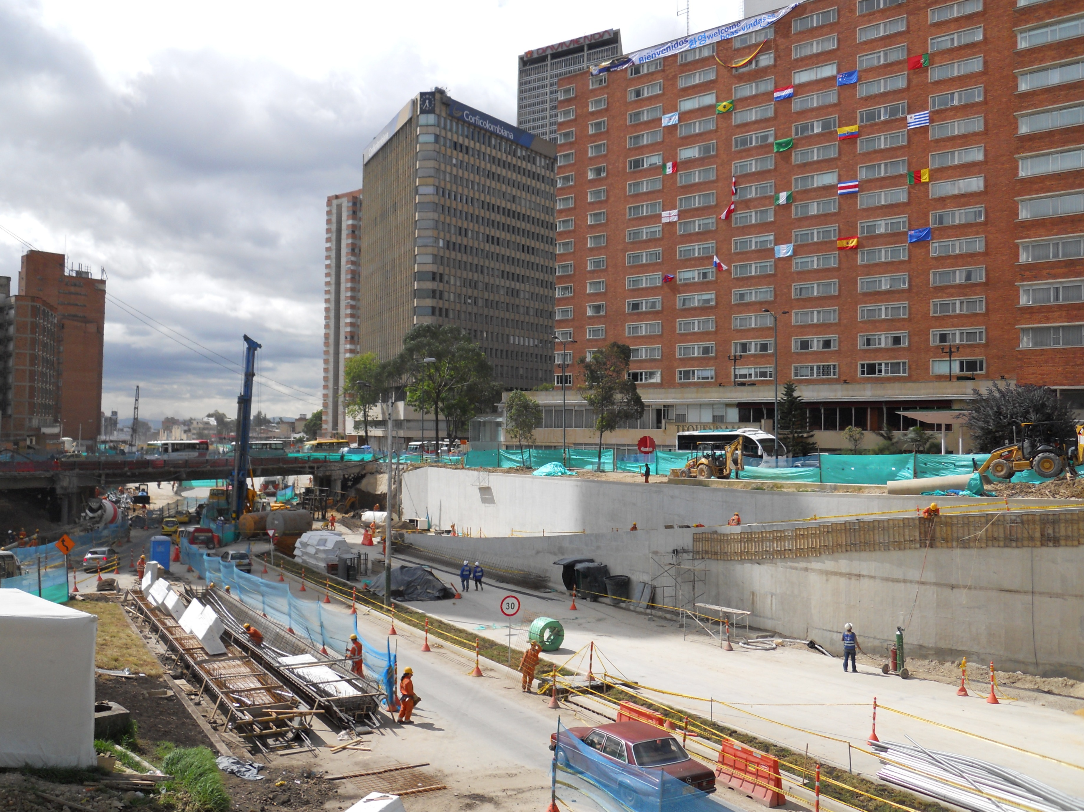 Avenida 26 a la altura de carrera 13, construcción de la fase III de Transmilenio.